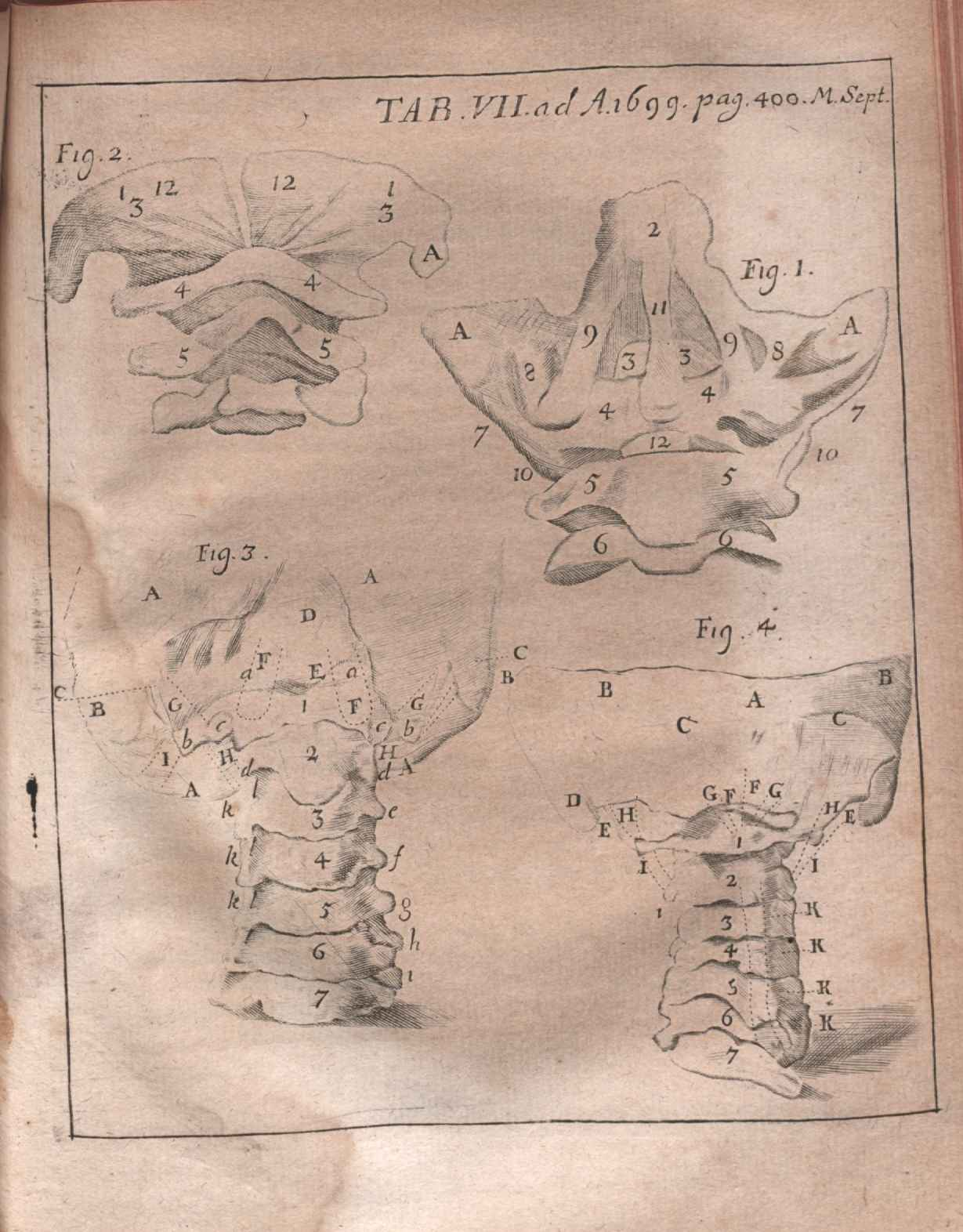 Illustration